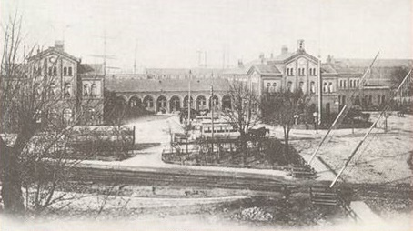 Fotografie des alten Geestemünder Bahnhofs